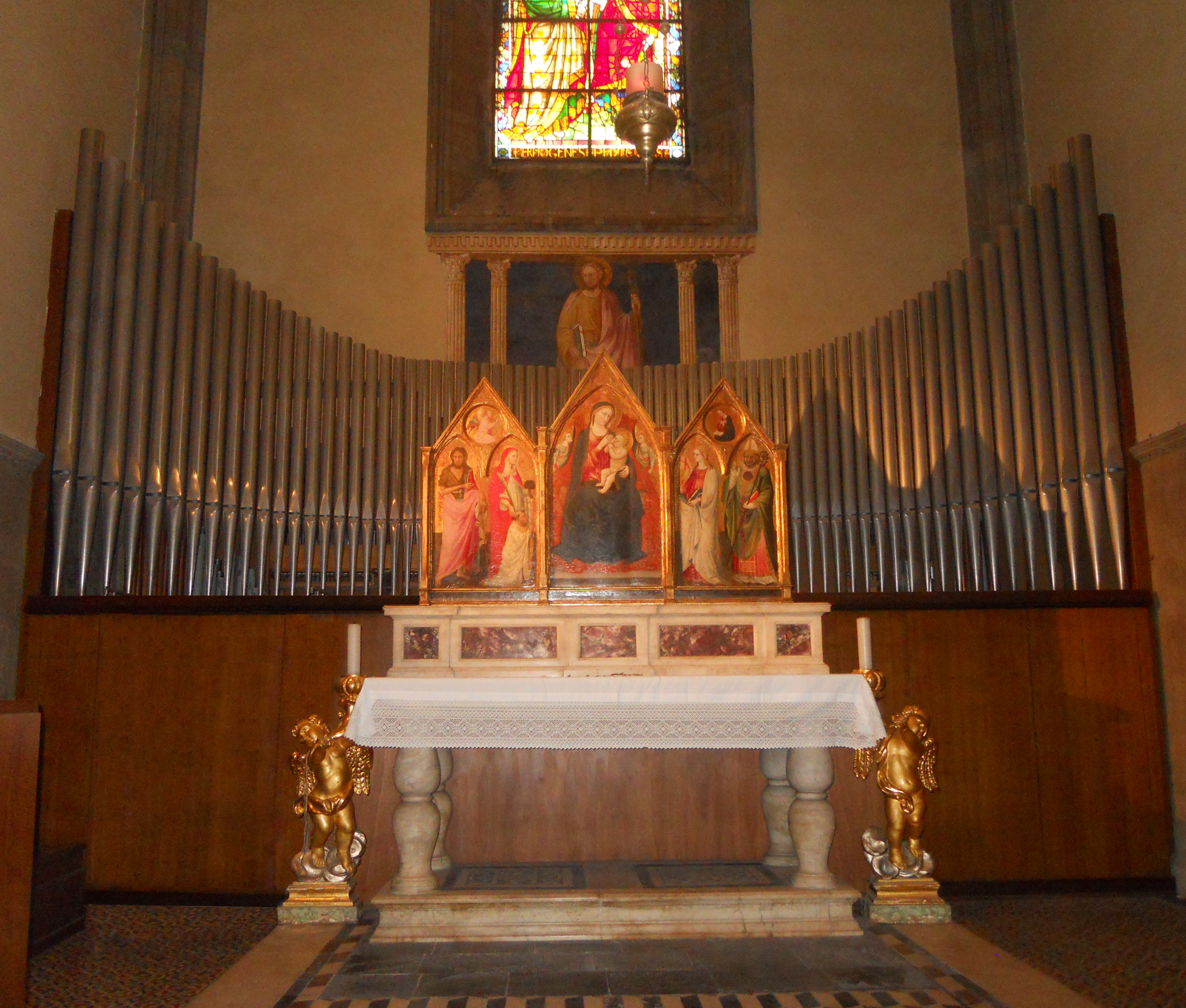 Organo Mascioni opus 805 (II+P/28)